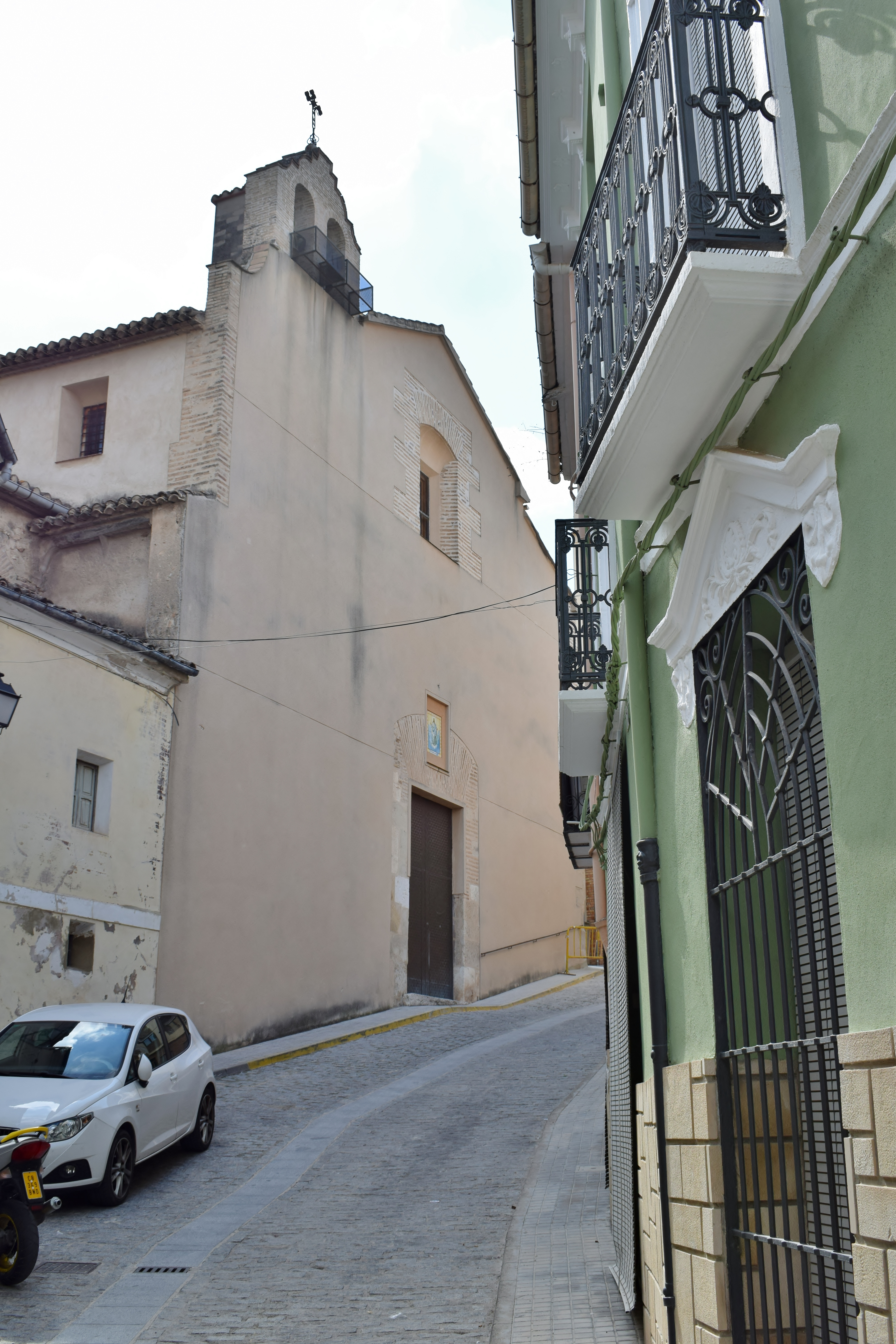 Agullent.